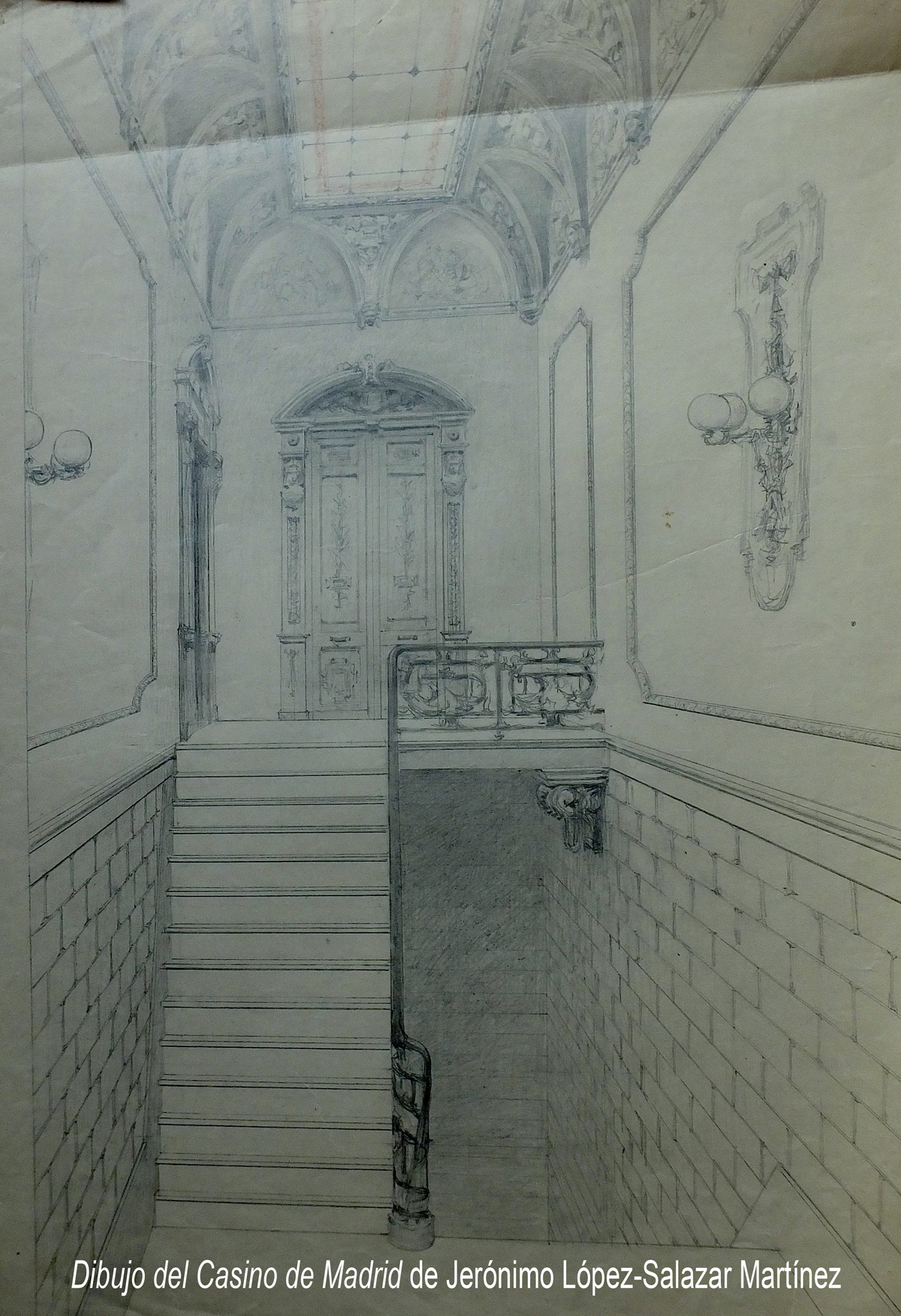 Dibujo del Casino de Madrid de Jerónimo López-Salazar Martínez 1918